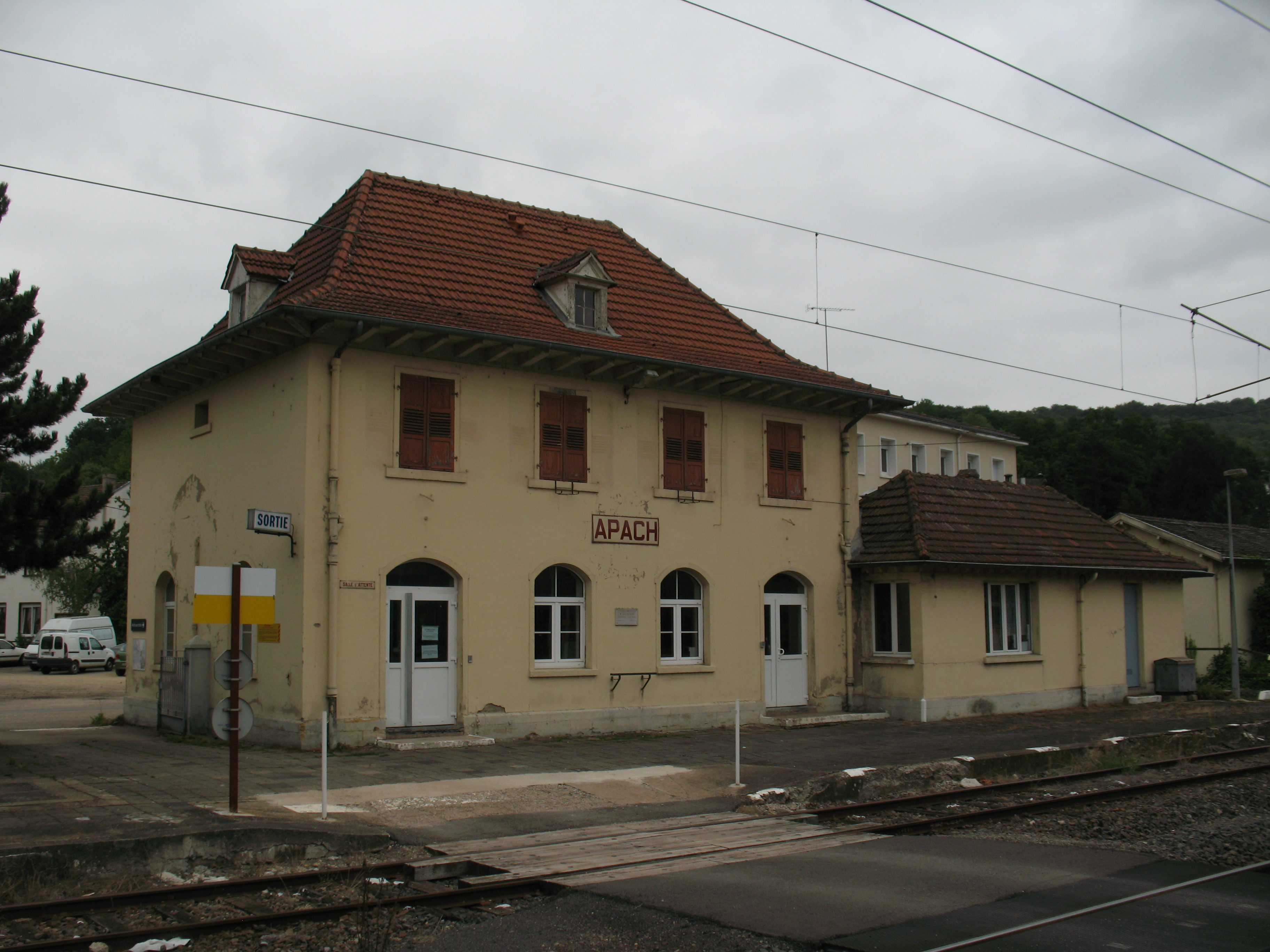 La gare d'Apach vue depuis les voies.